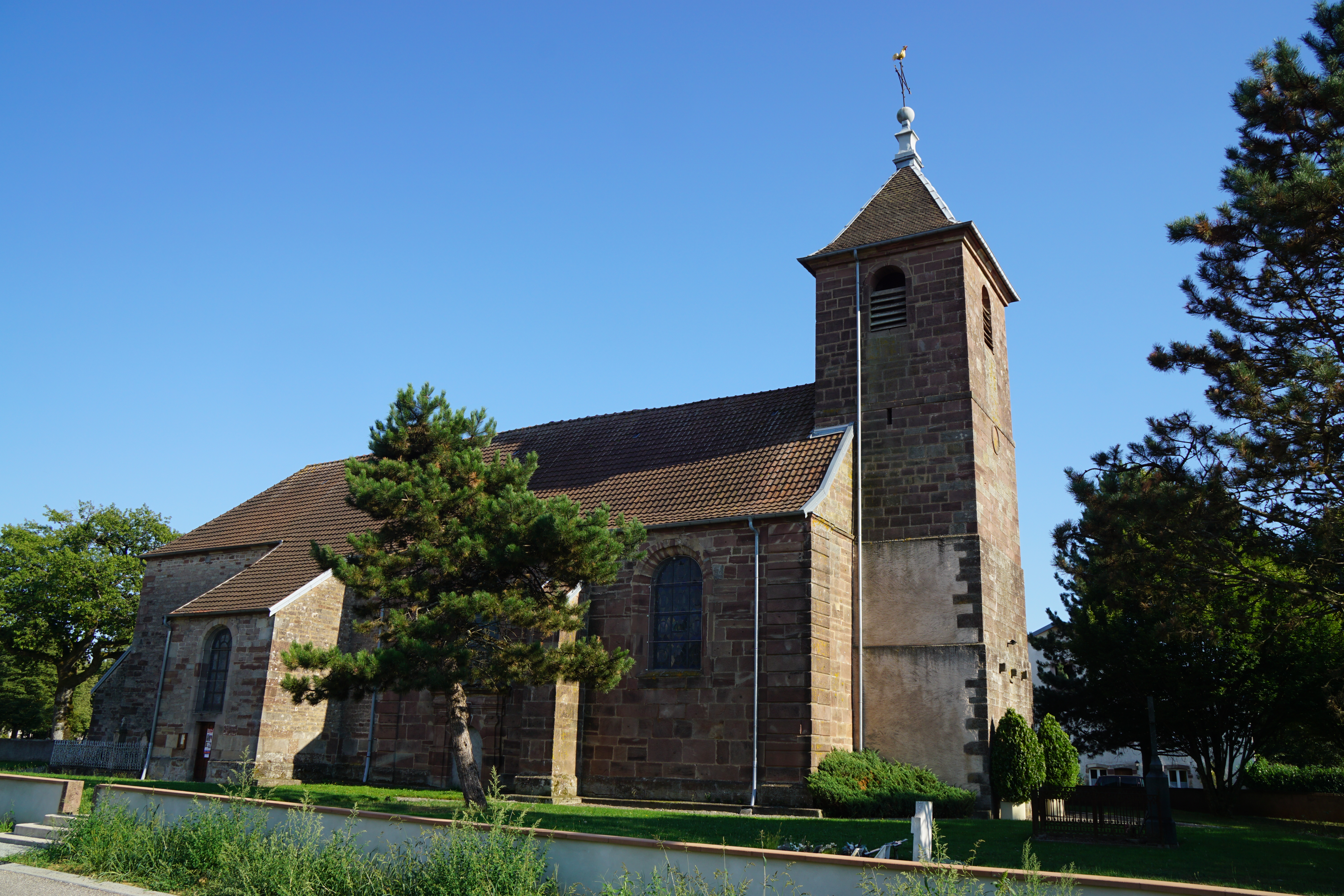 L'église Saint-Hippolyte de Roye (Haute-Saône)